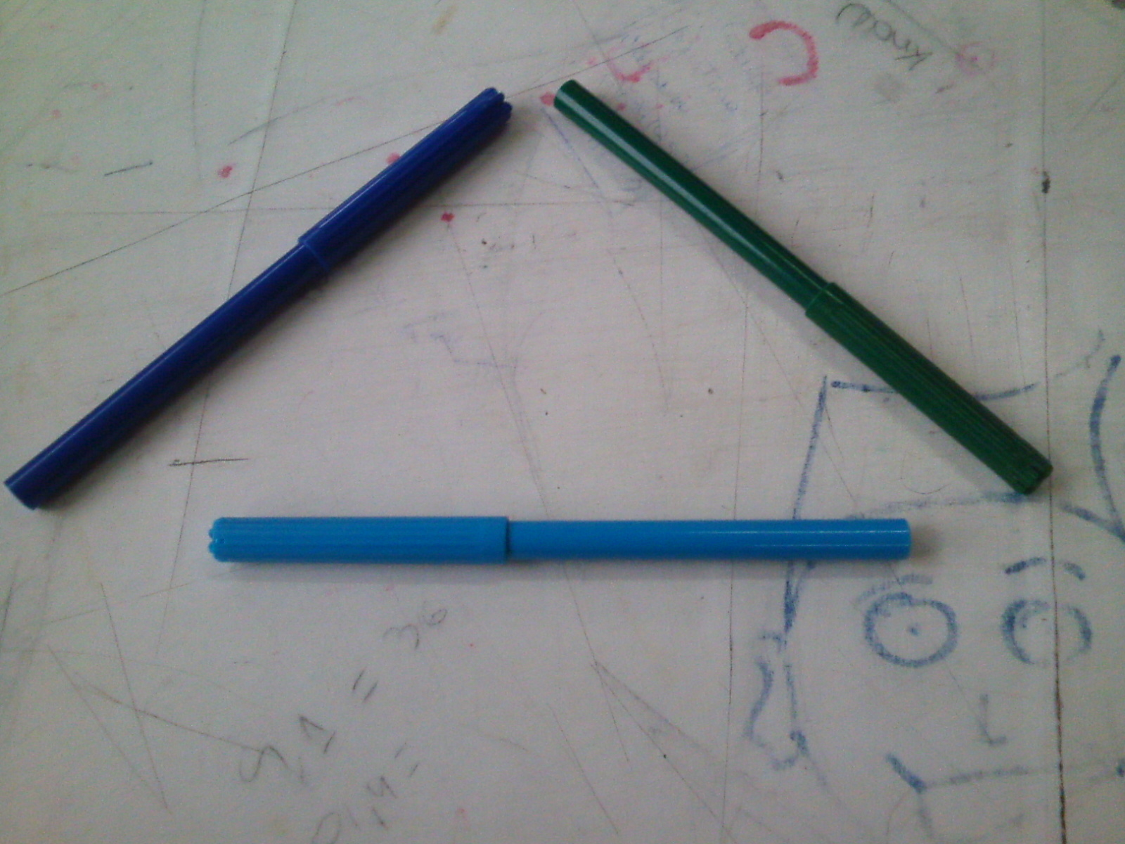 Ley de Cierre -Psicología